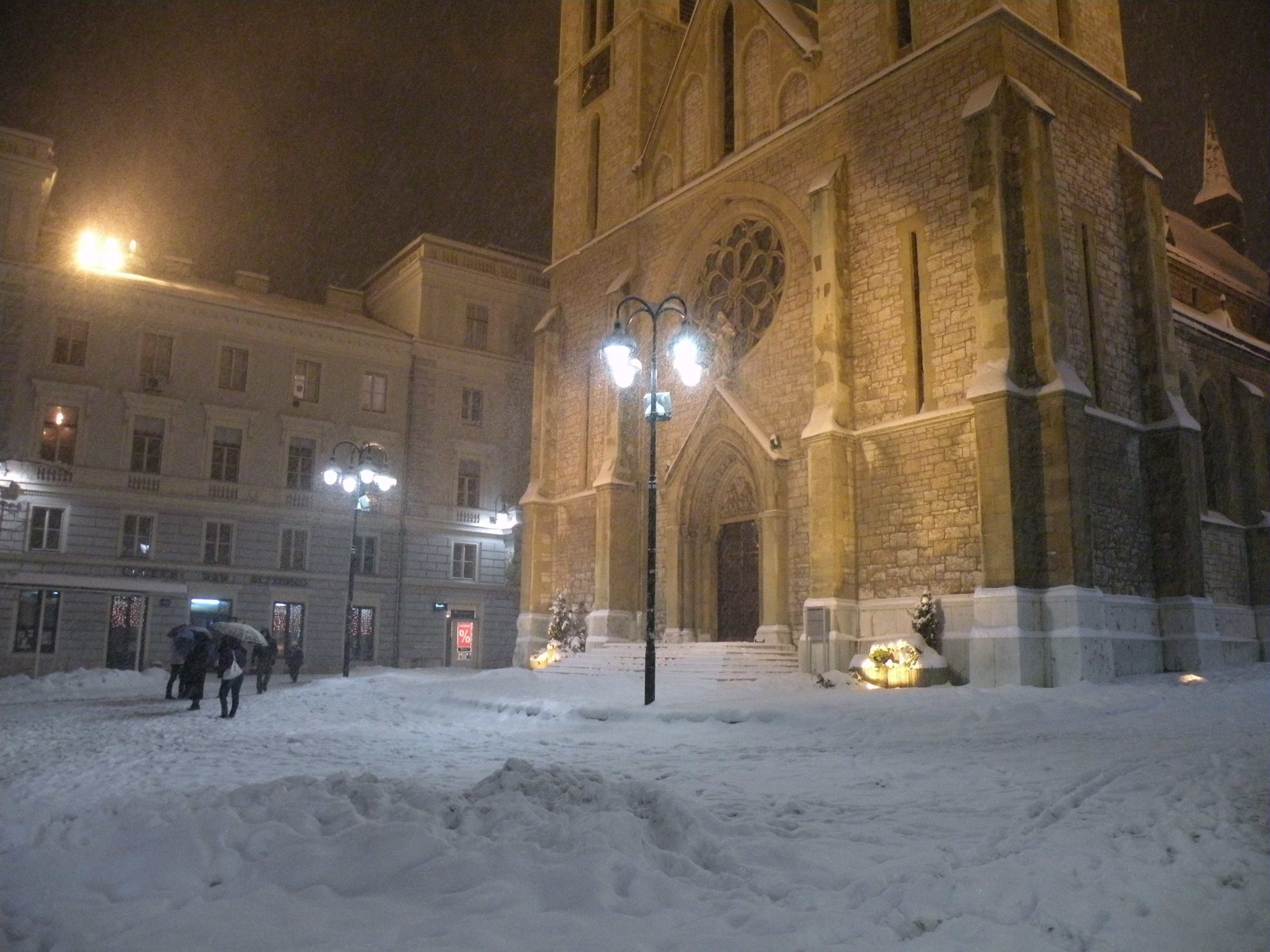 Sarajevo Katedrala